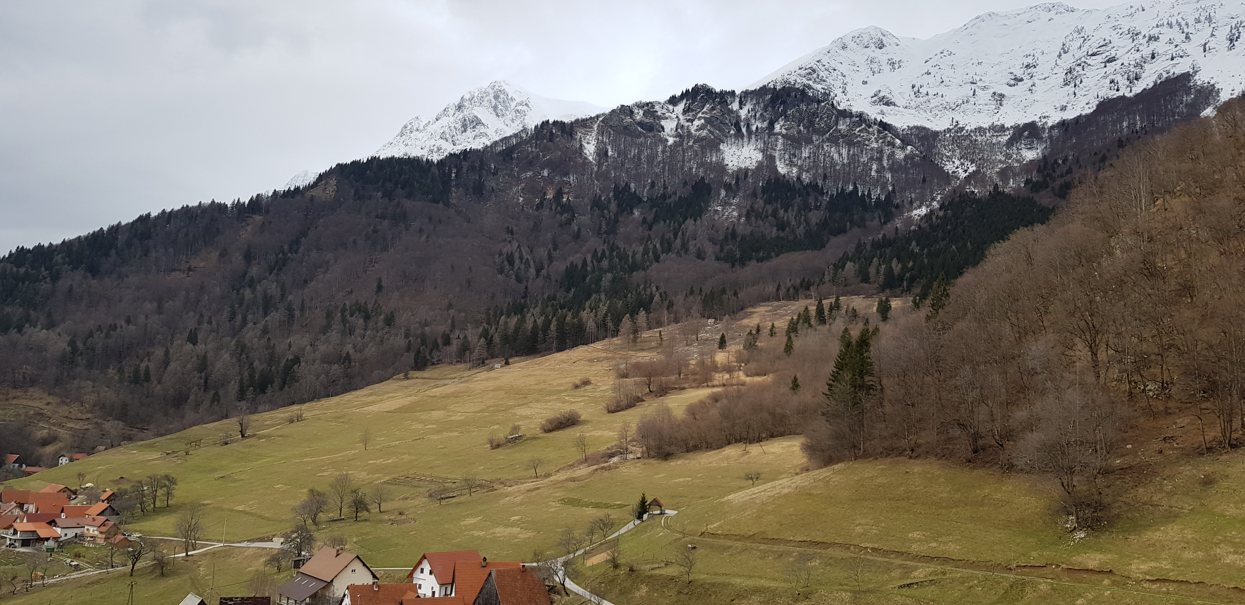 Prisojna pobočja pod Črno prstjo, vidna iz Baškge grape